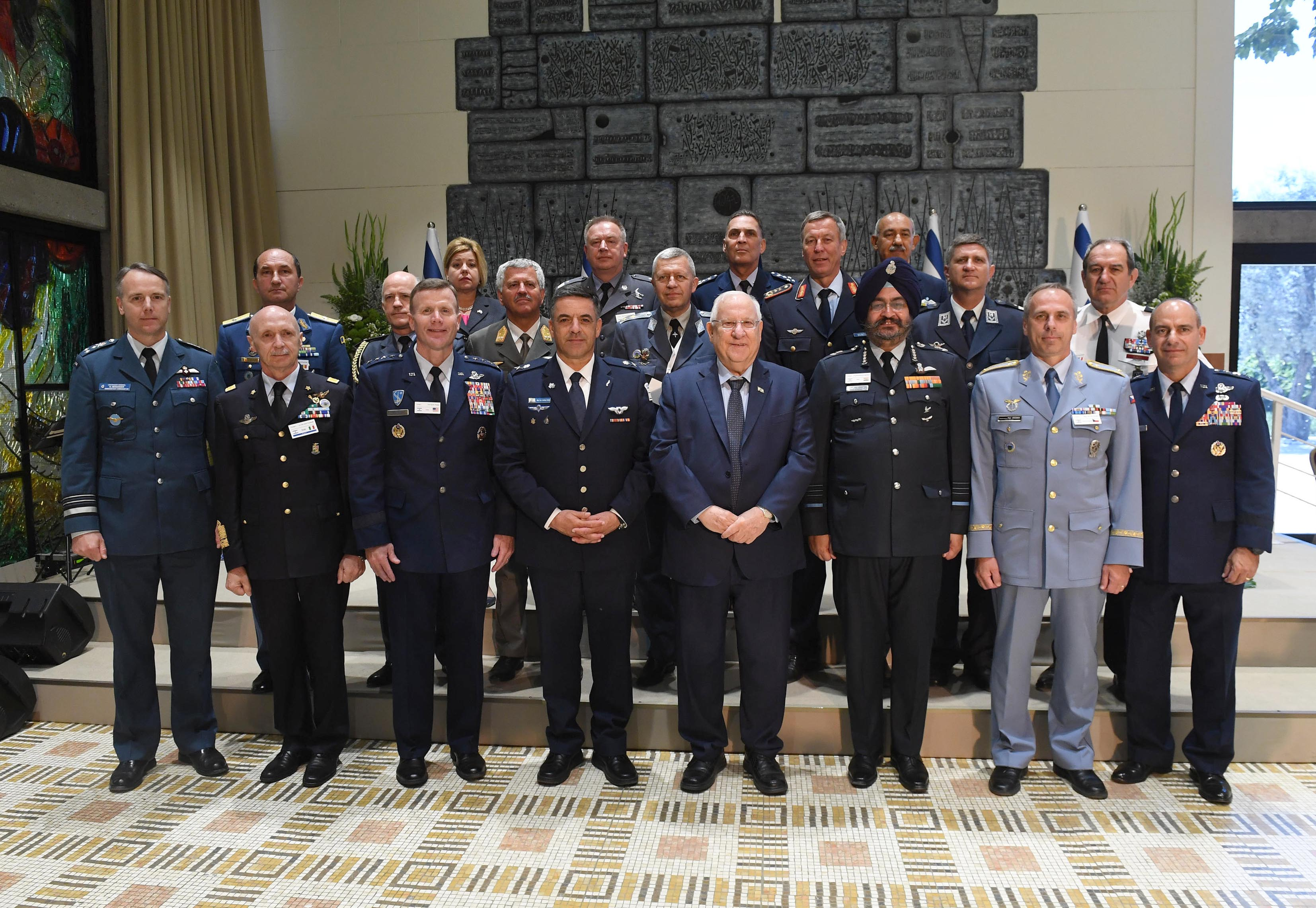 ראובן ריבלין נשיא מדינת ישראל בכנס מפקדי חיילות האוויר מהעולם שהתקיים בירושלים